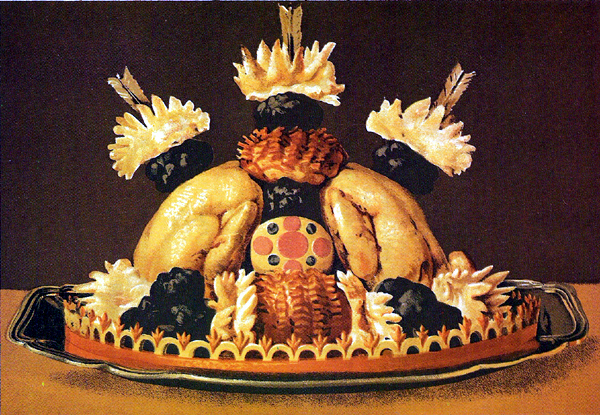 Planche en couleur du « Livre de cuisine » de Jules Gouffé (1867)